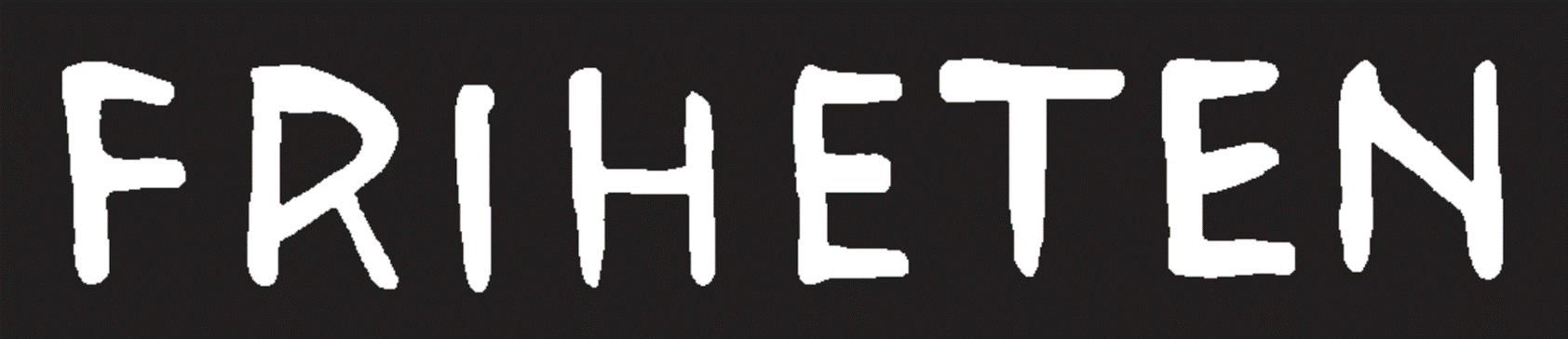 Emblemet til ukeavisen Friheten.